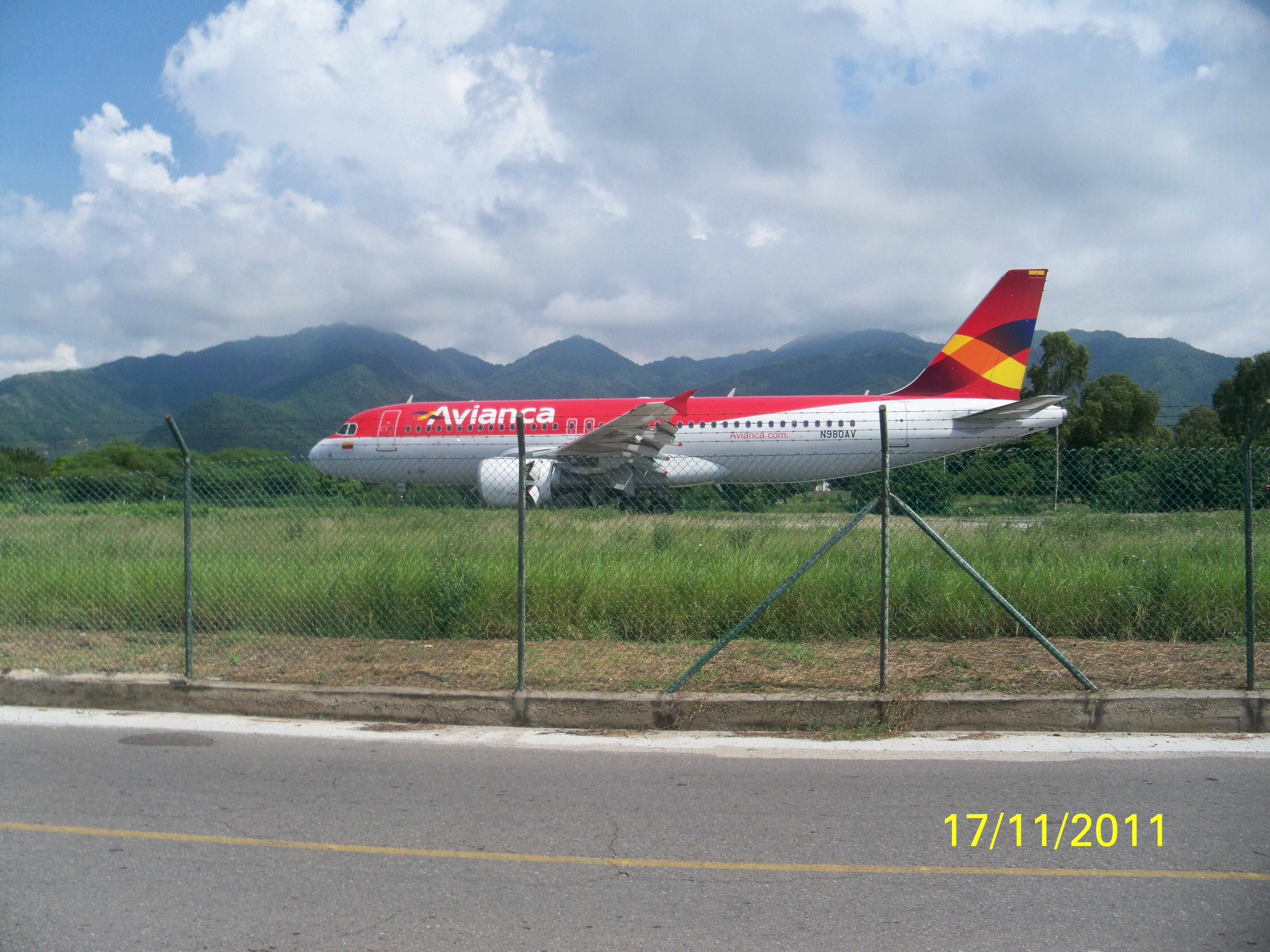 Avianca en Aeropuerto de Santa Marta